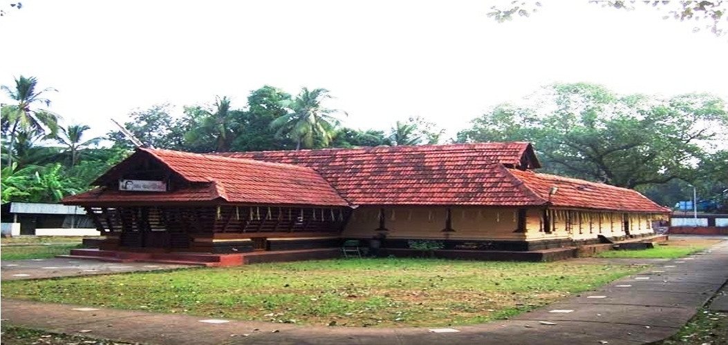 കാട്ടകമ്പാലക്ഷേത്രം